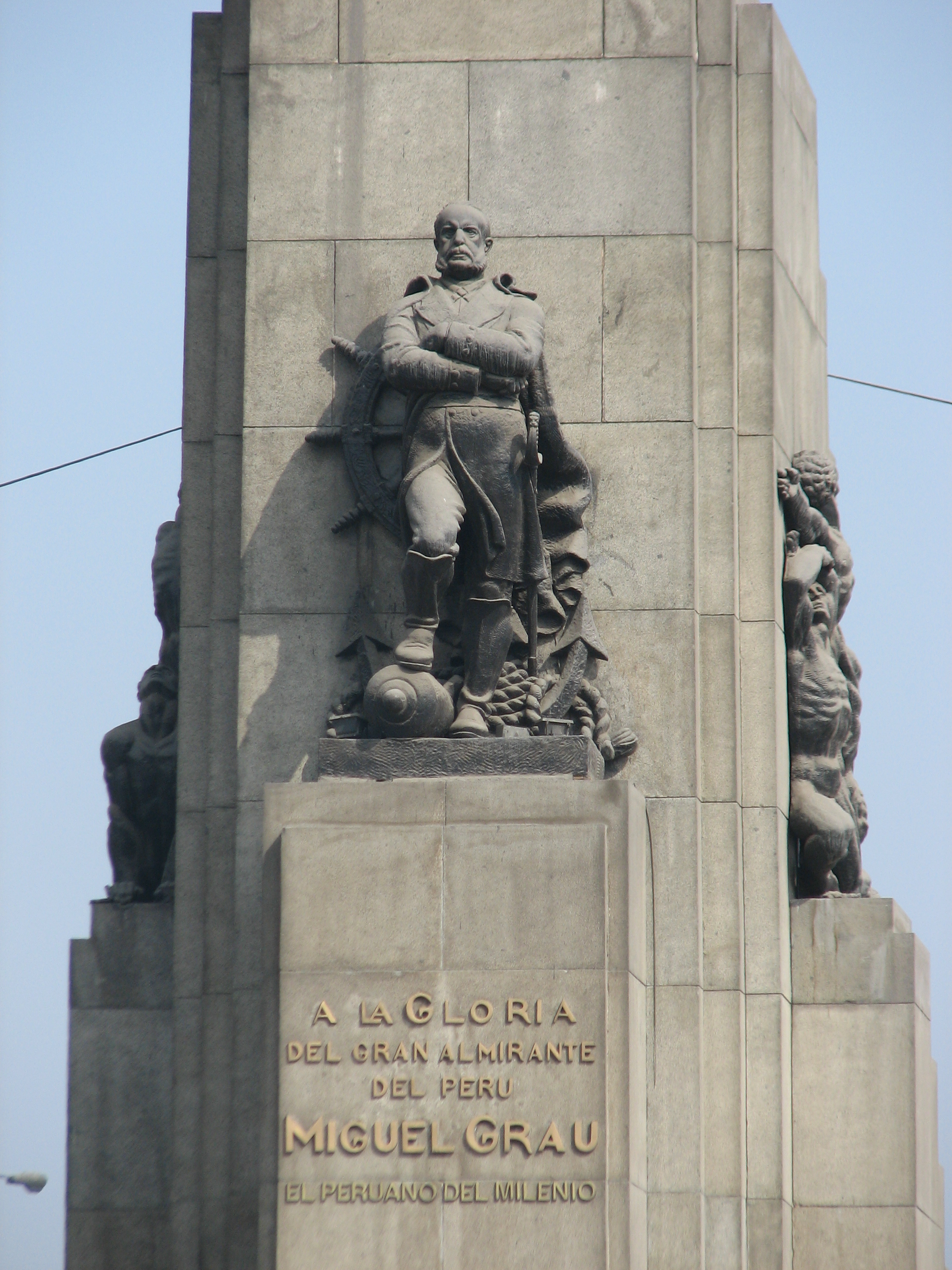 Statue of Miguel Grau on Avenida Grau, Lima/Lima, Peru.